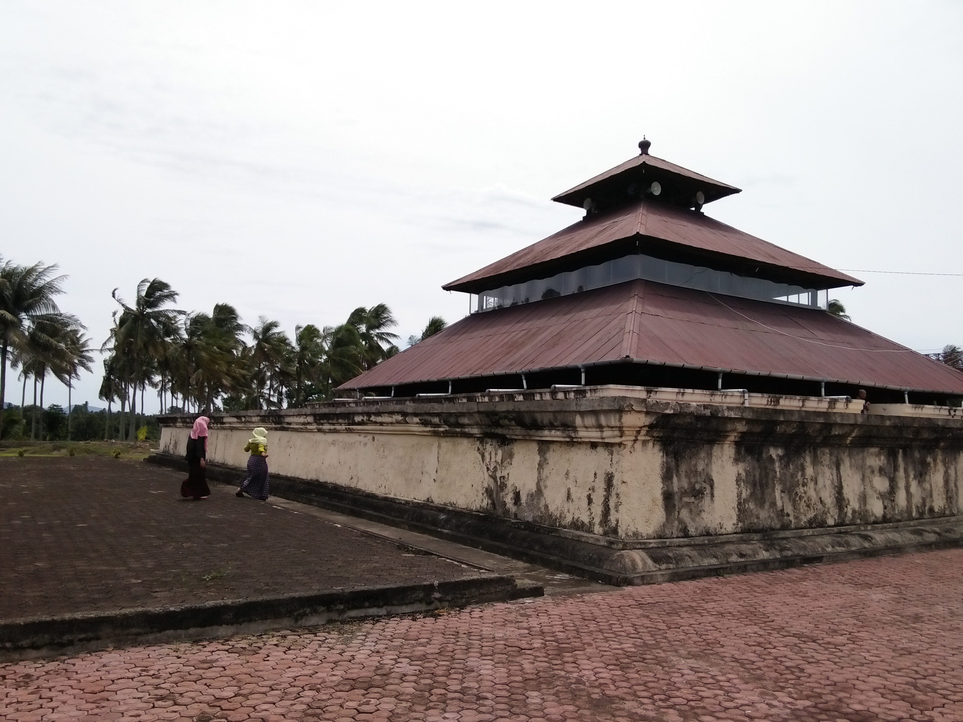 Tampak Luar Desain Mesjid Tua Indrapuri Aceh Besar